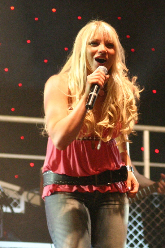 ED0017.jpg